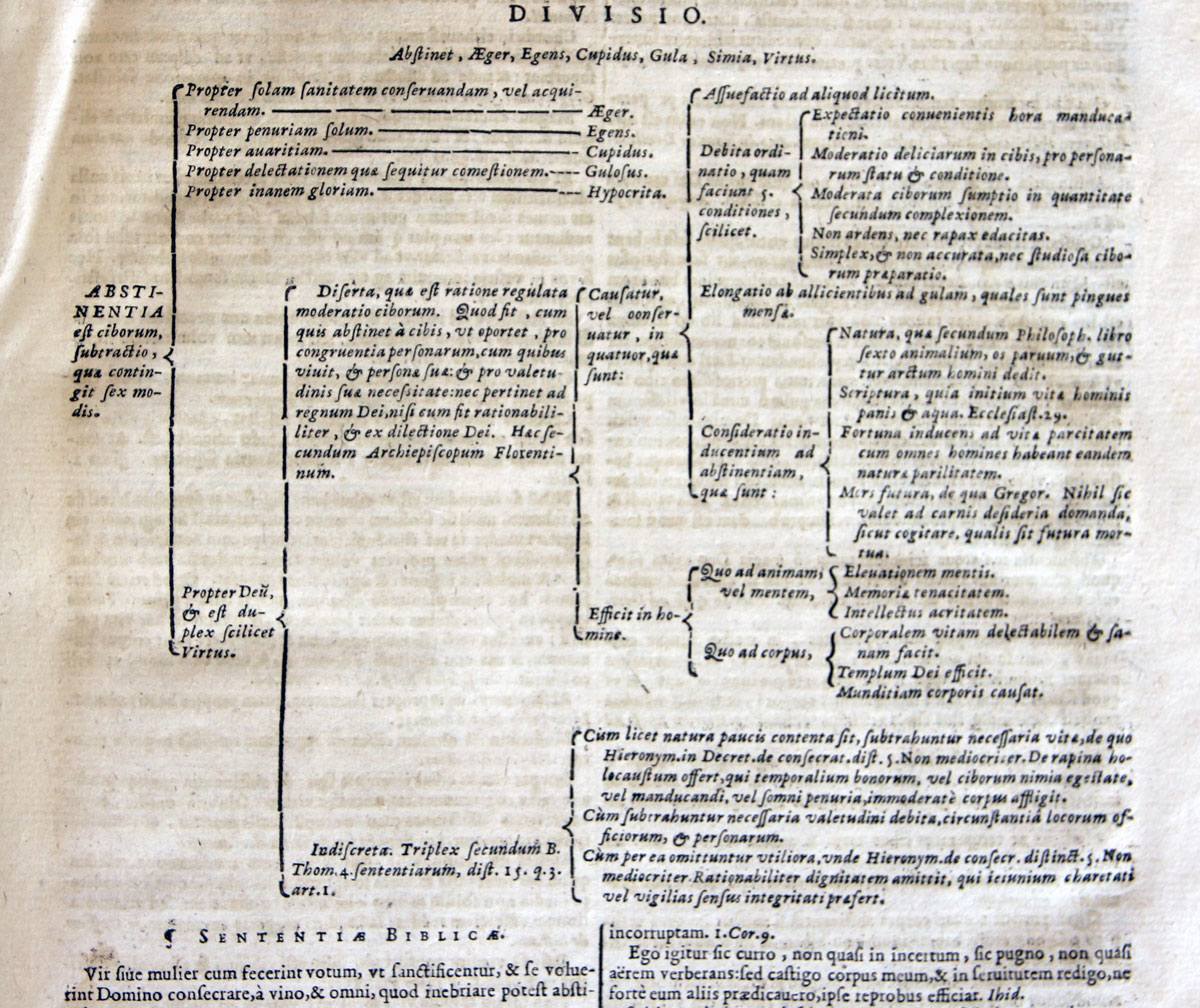 Exemple de division d'un sujet dans le Polyanthea de Joseph Lang d'après Nani Mirabelli, édition de 1659.